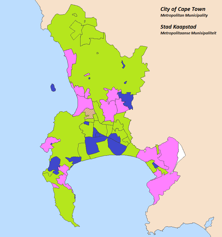 Karte mit Darstellung der jeweils größten Bevölkerungsgruppe in den Orten der Metropolgemeinde Stadt Kapstadt gemäß Volkszählung 2011 hellgrün: Farbige, dunkelblau: Schwarze, rosa: Weiße, weiß: unbewohnt; schraffiert: genau gleicher Anteil der zwei größten Bevölkerungsgruppen